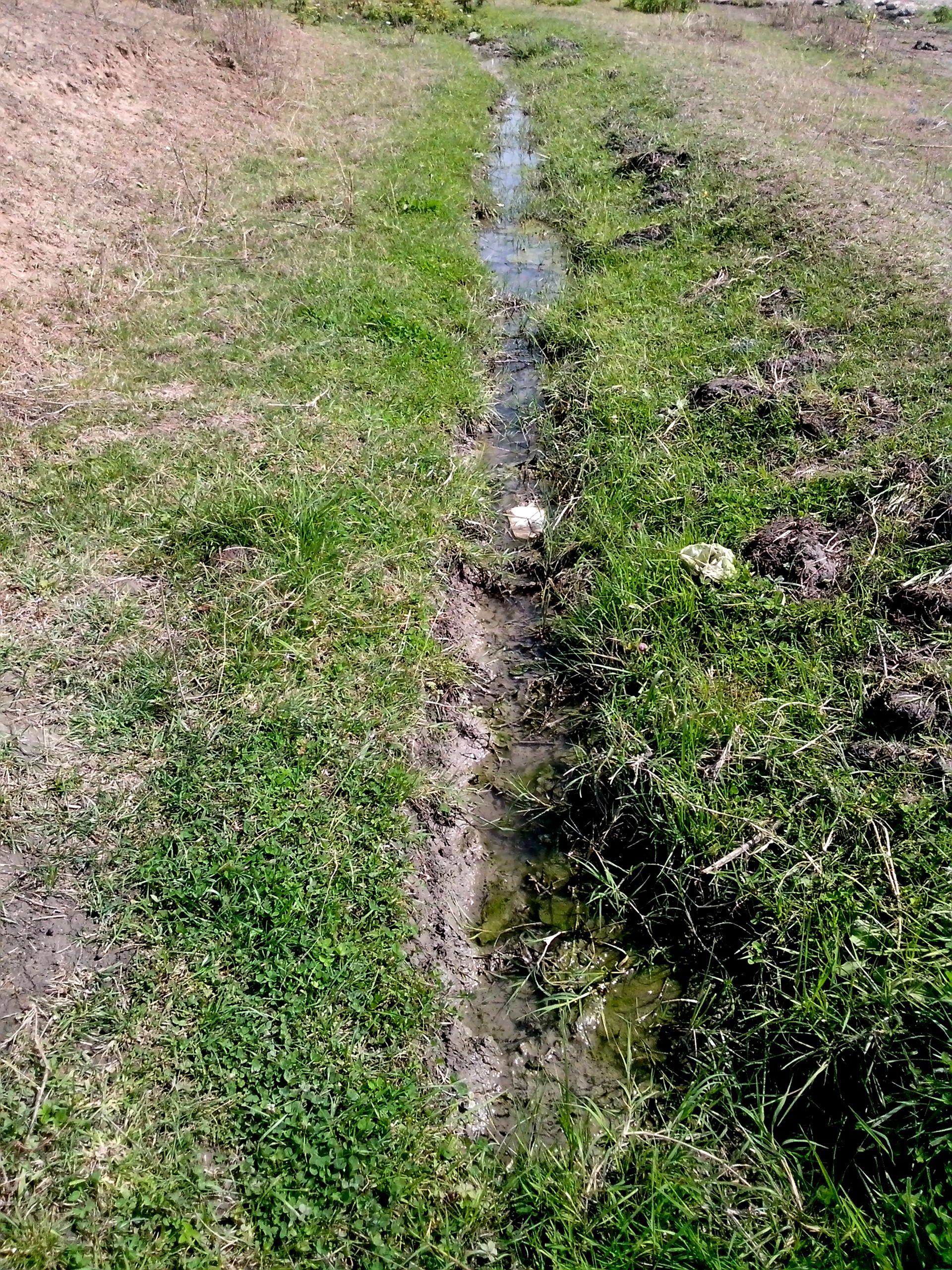 Dəvədabanıda arx